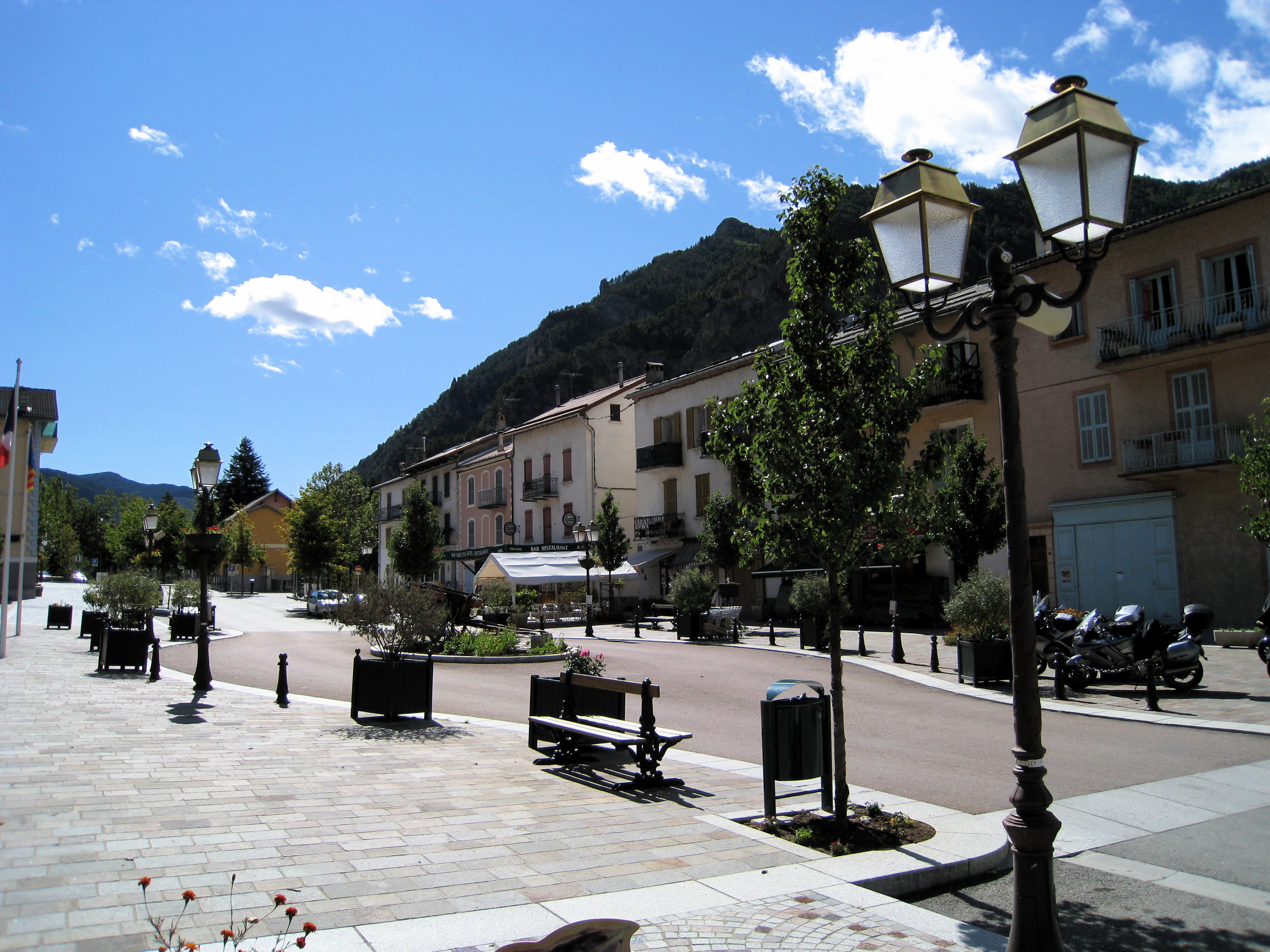 Guillaumes, Alpes-maritimes, France